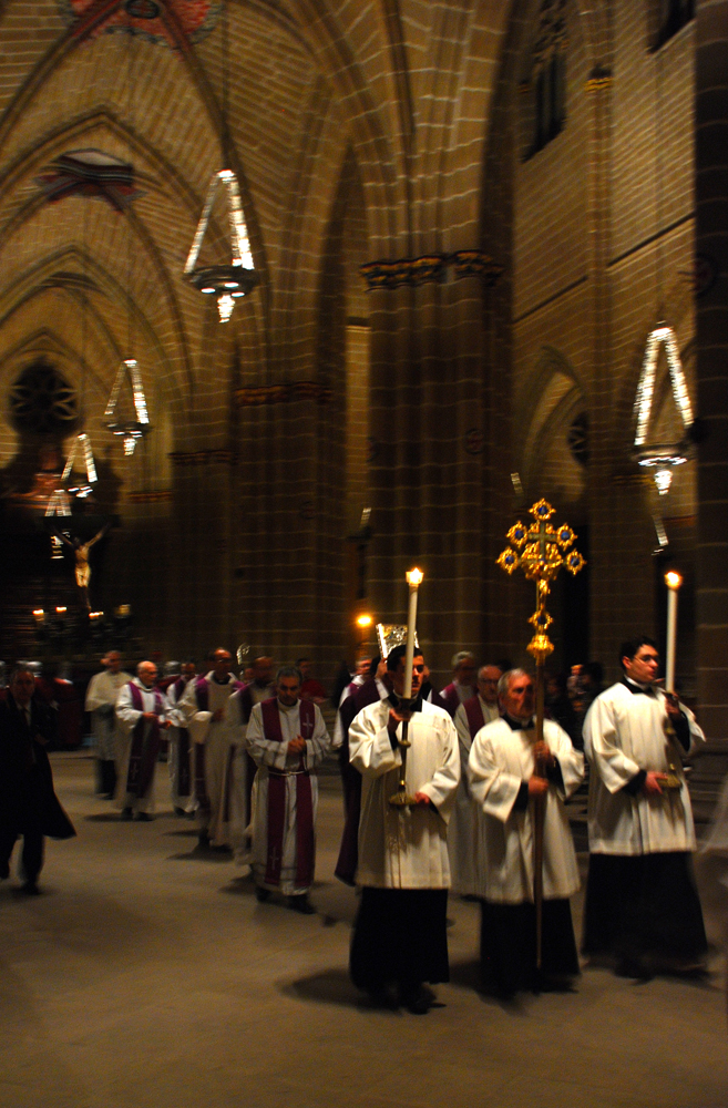 pamplona